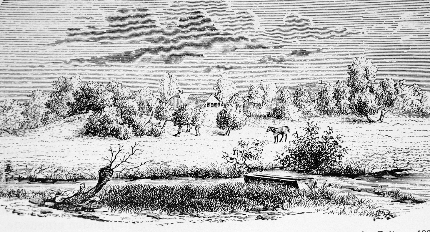 Zeichnung von der Burgstelle der Scheverlingenburg in Walle (Schwülper)